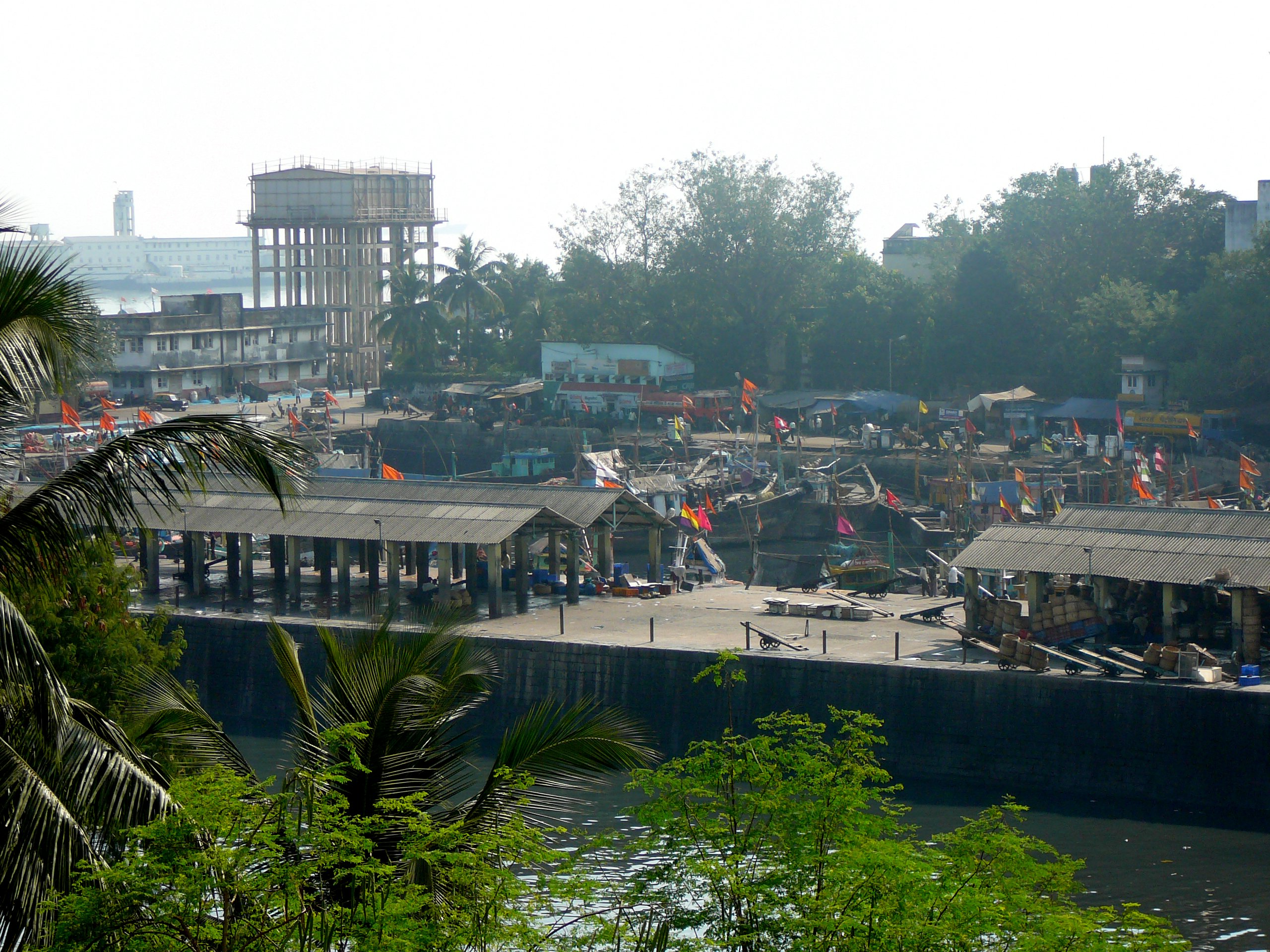 Sasson Docks